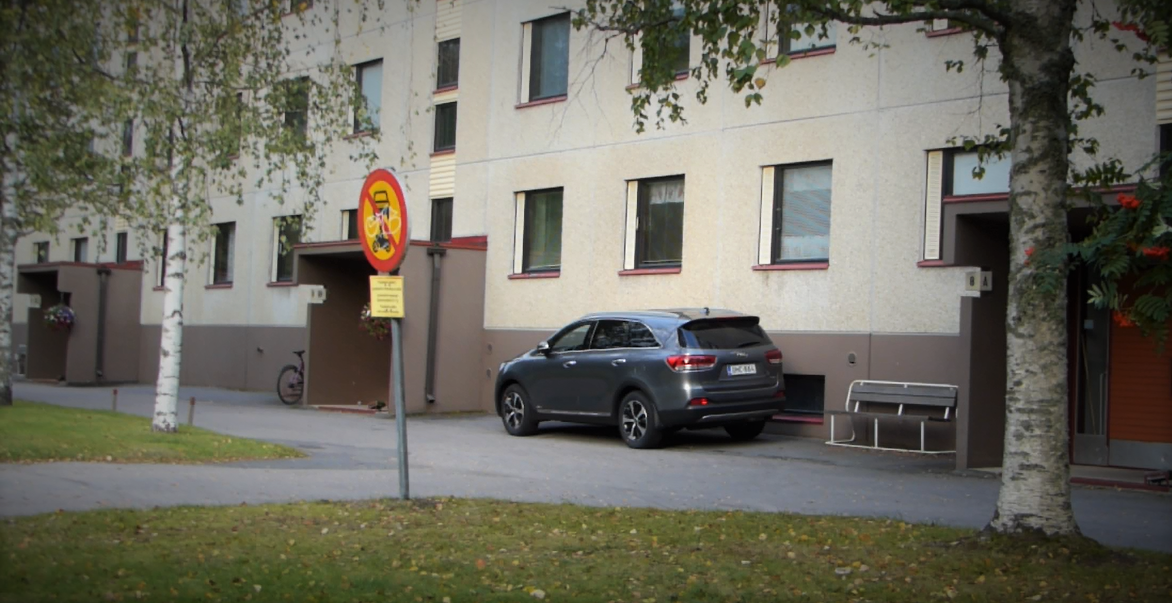 Kangaslampi, Jyväskylä